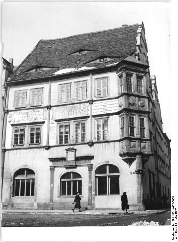 Görlitz, Untermarkt, Rathausapotheke Zentralbild Klein Stra.-Be. 11.5.52 Stadtbilder aus Görlitz. Durch die Unterstützung unserer Regierung werden die alten Kulturbauten der Stadt Görlitz erhalten und instandgesetzt. UBz: Der Renaissancebau der (Rathausapotheke) am Untermarkt.